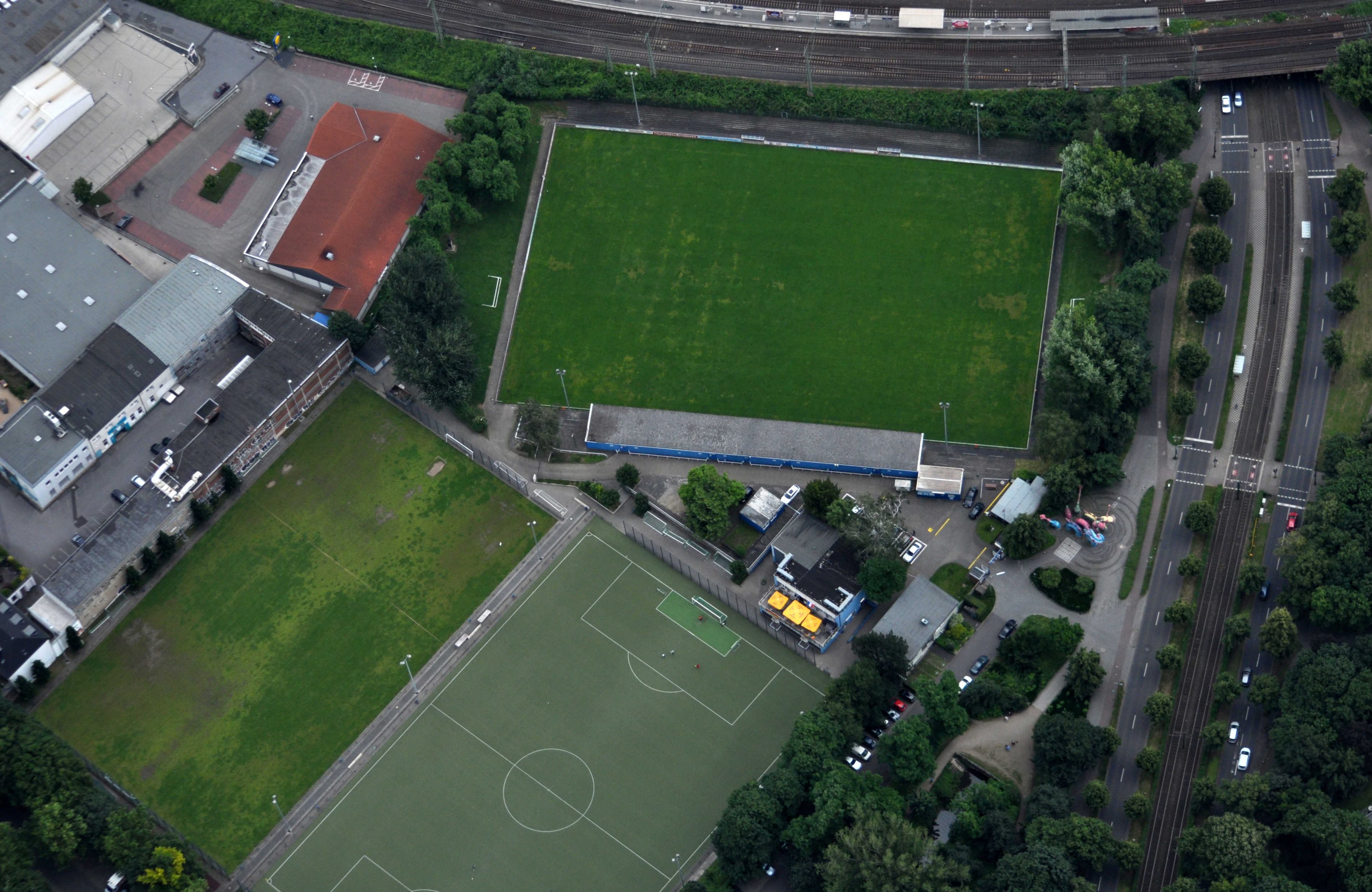 Fußballstadion an der Feuerbachstrße in Düsseldorf. Luftaufnahme aus einer Höhe von ca. 600m über Grund